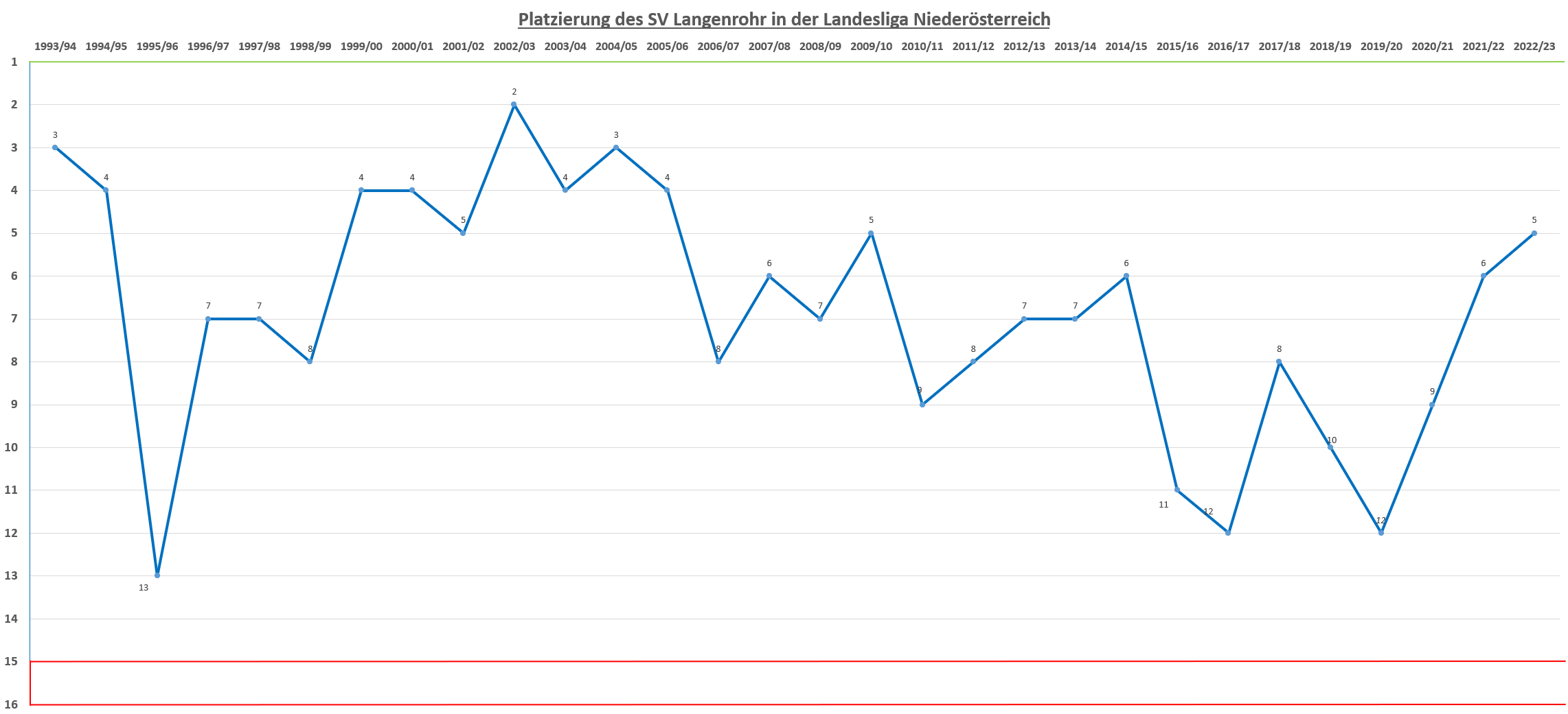 Tabellenplatzhiestorie des SV Langenrohrs (Stand Saisonende 2016)